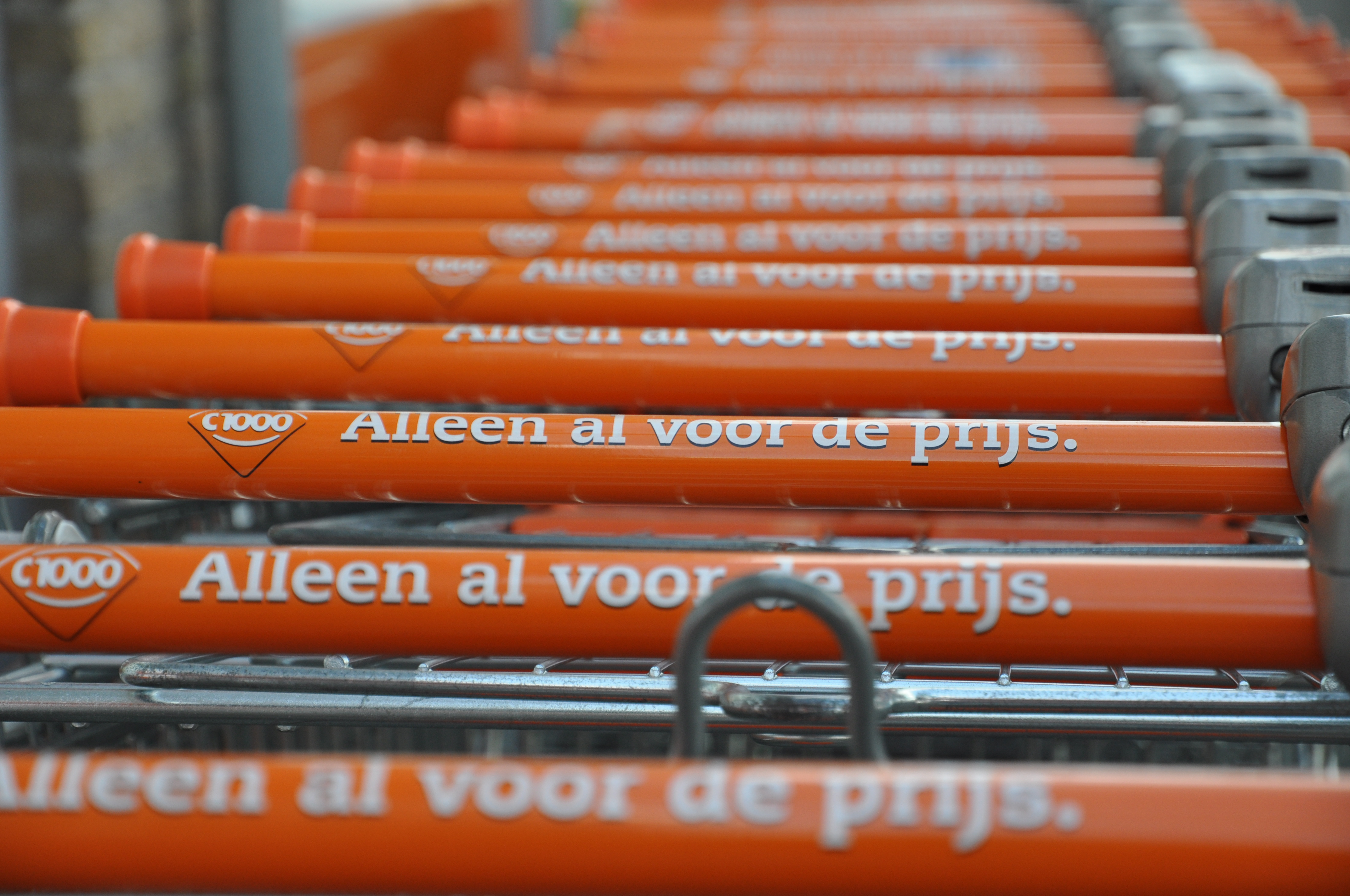 Winkelwagentjes bij de C1000 in Haastrecht.